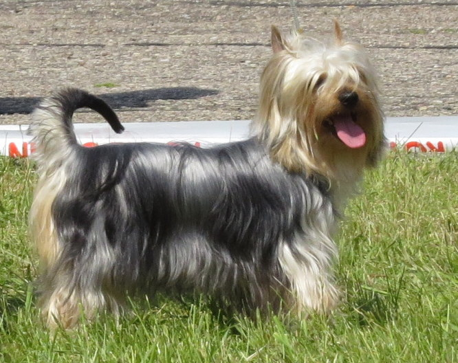 Moletai May 2014